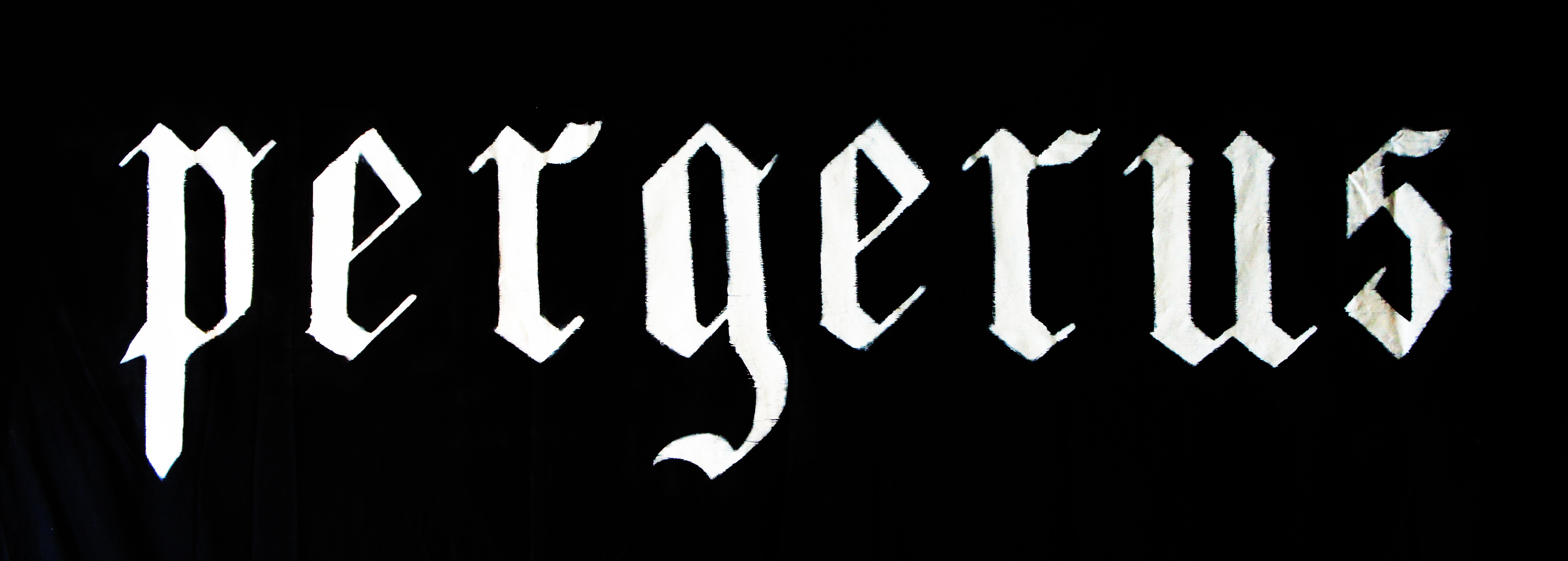 Black Metal rühmituse Pergerus kangale maalitud logo